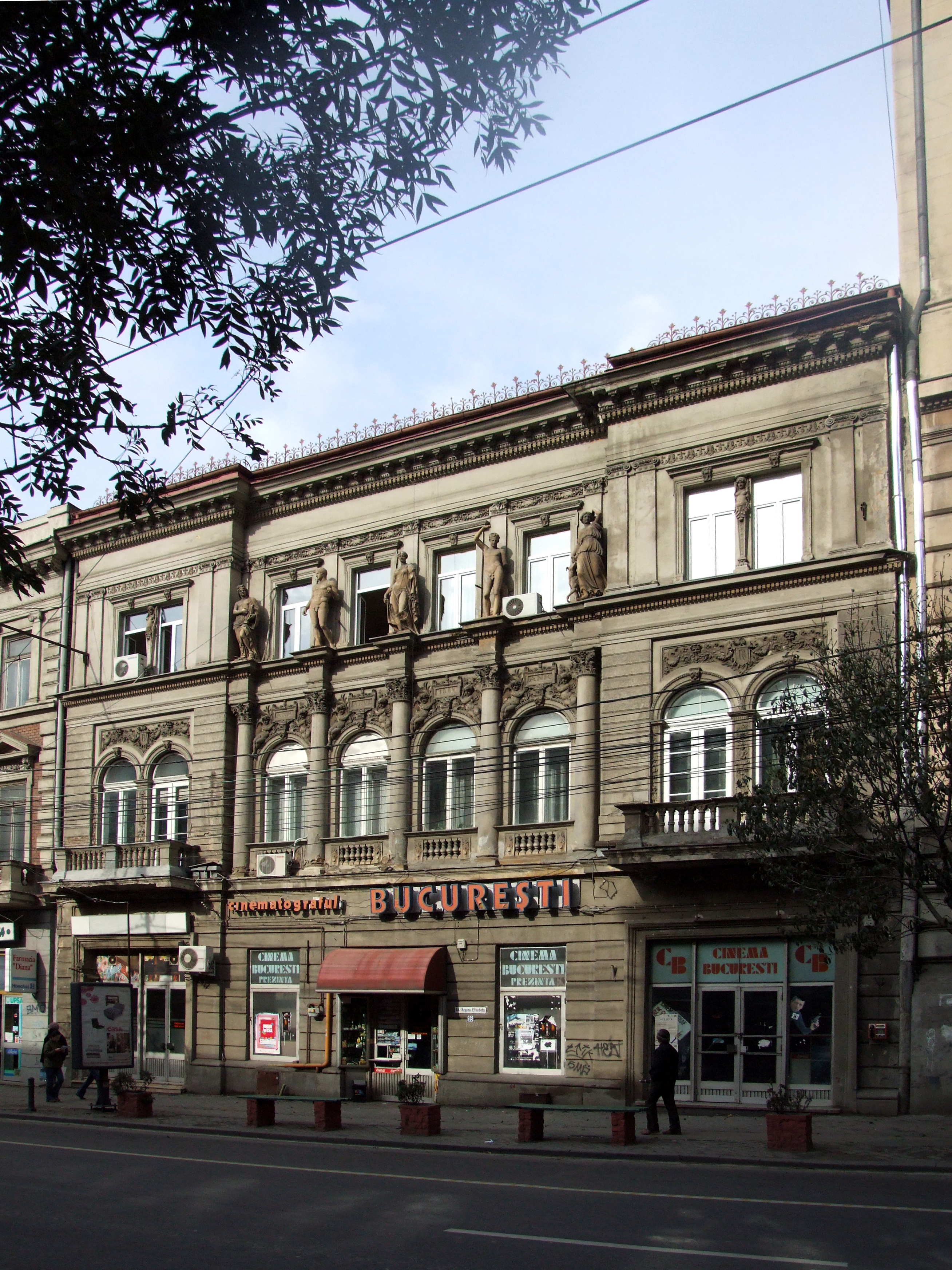 Cinema București